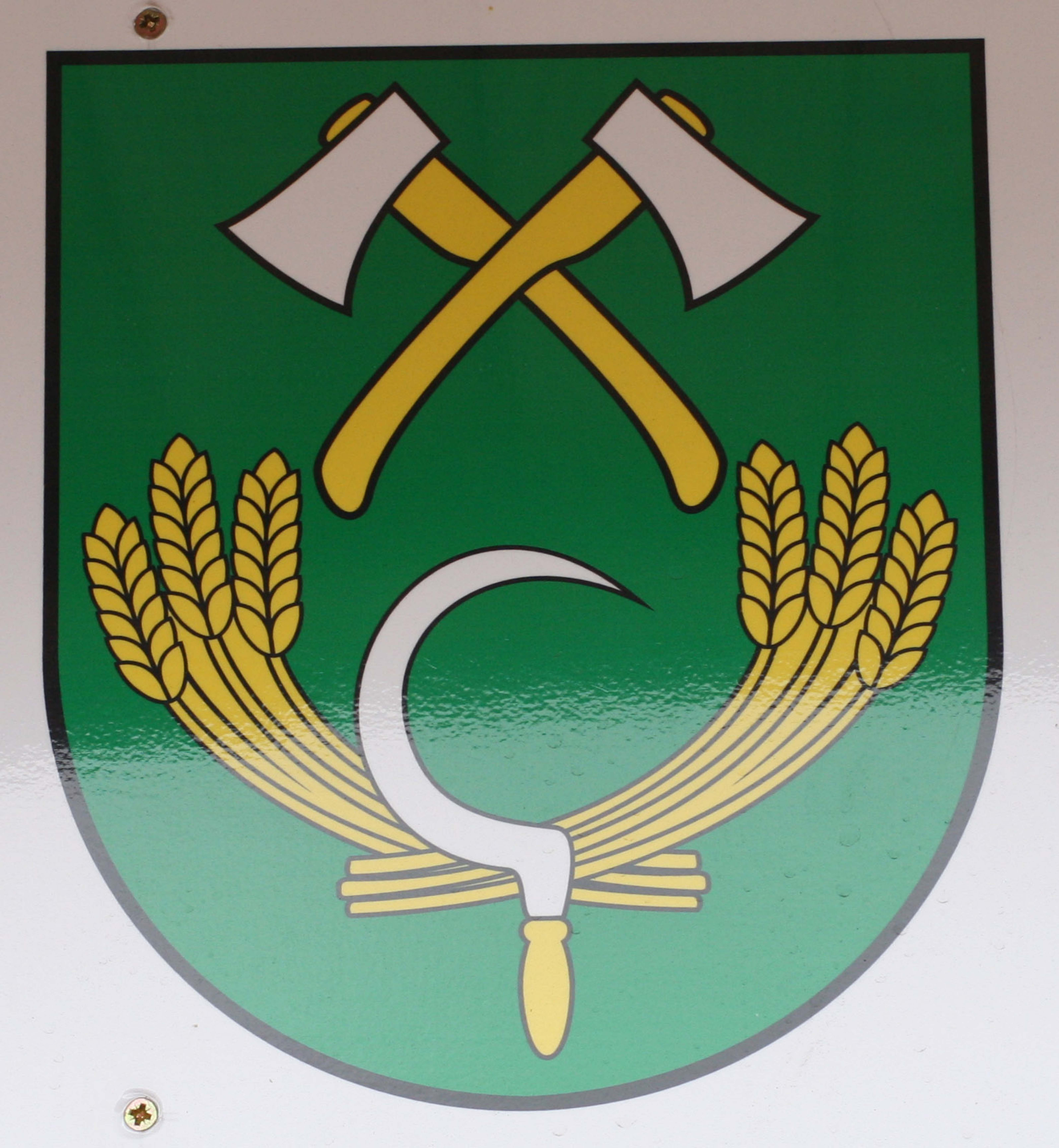 Erb obce Matovce (HR: ?).